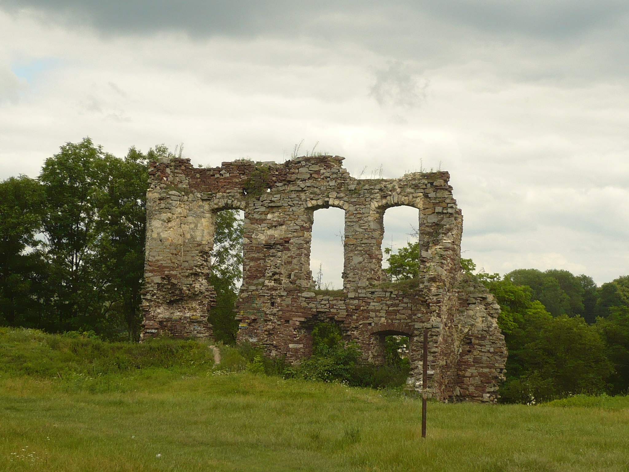 Buczacz. Zamek